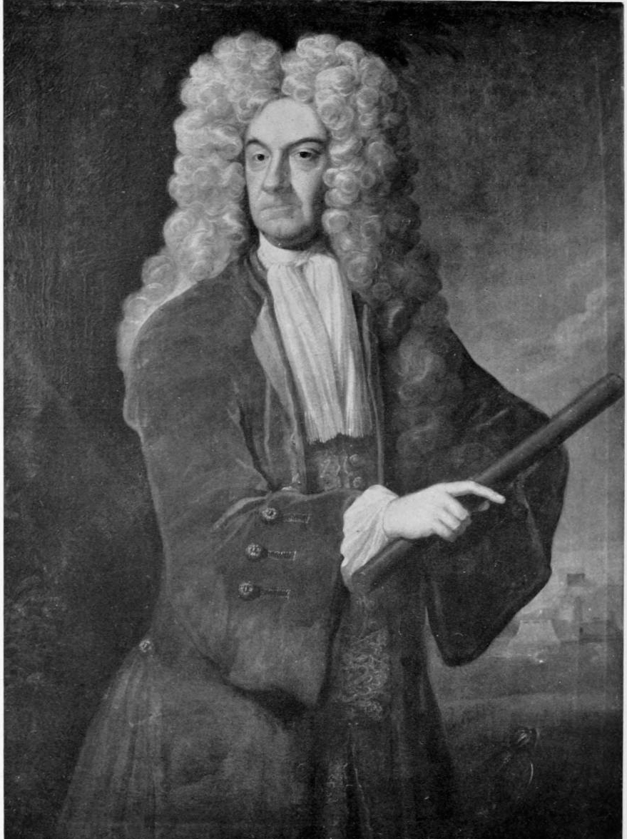 Sir George Oxenden (1620–1669)